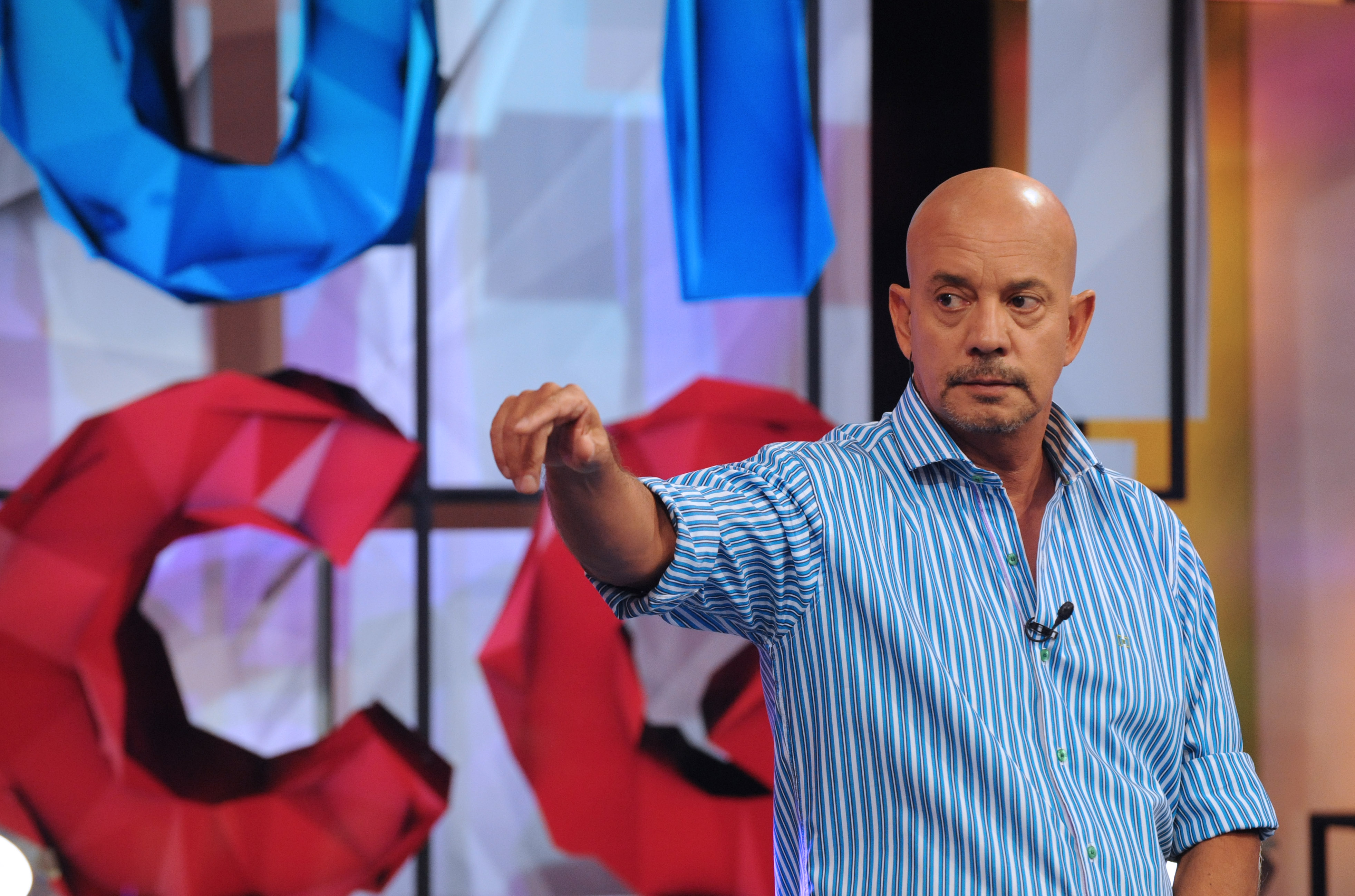 El Bahiano, conduciendo Una tarde cualquiera.